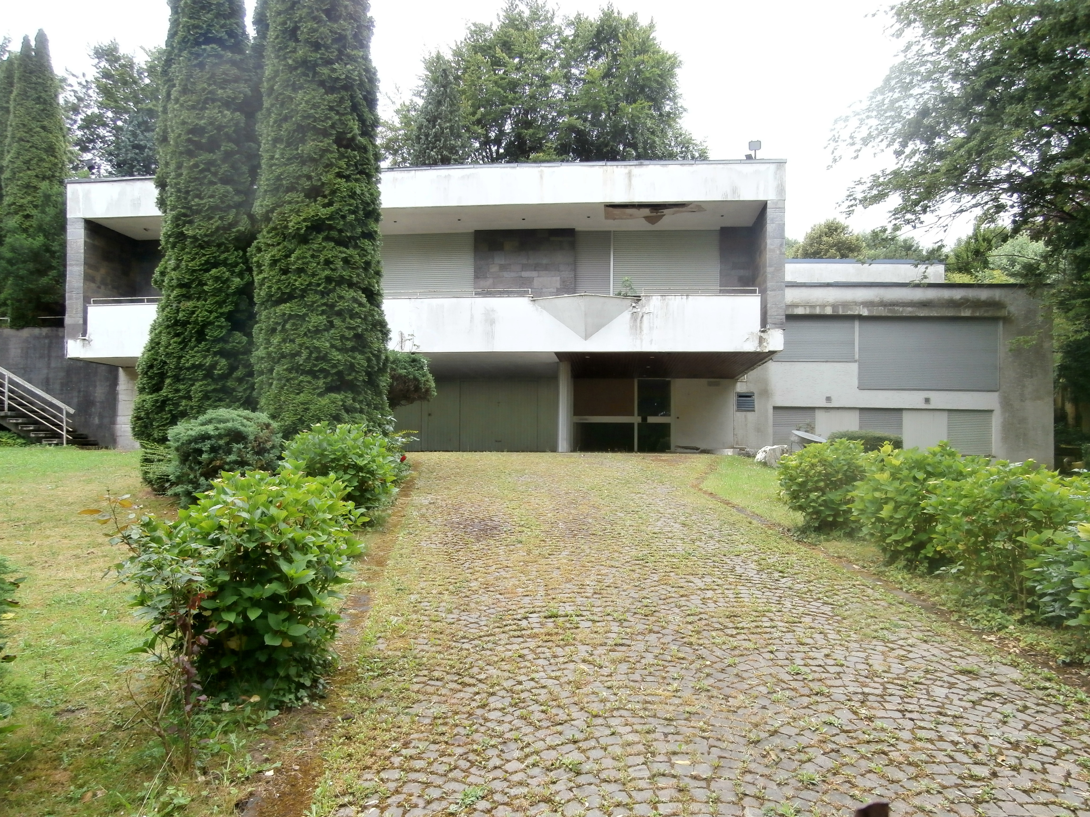 Ehemalige Residenz des Botschafters von Indonesien, Im Hag 24, Bonn-Mehlem. Architekt: Dirk Denninger